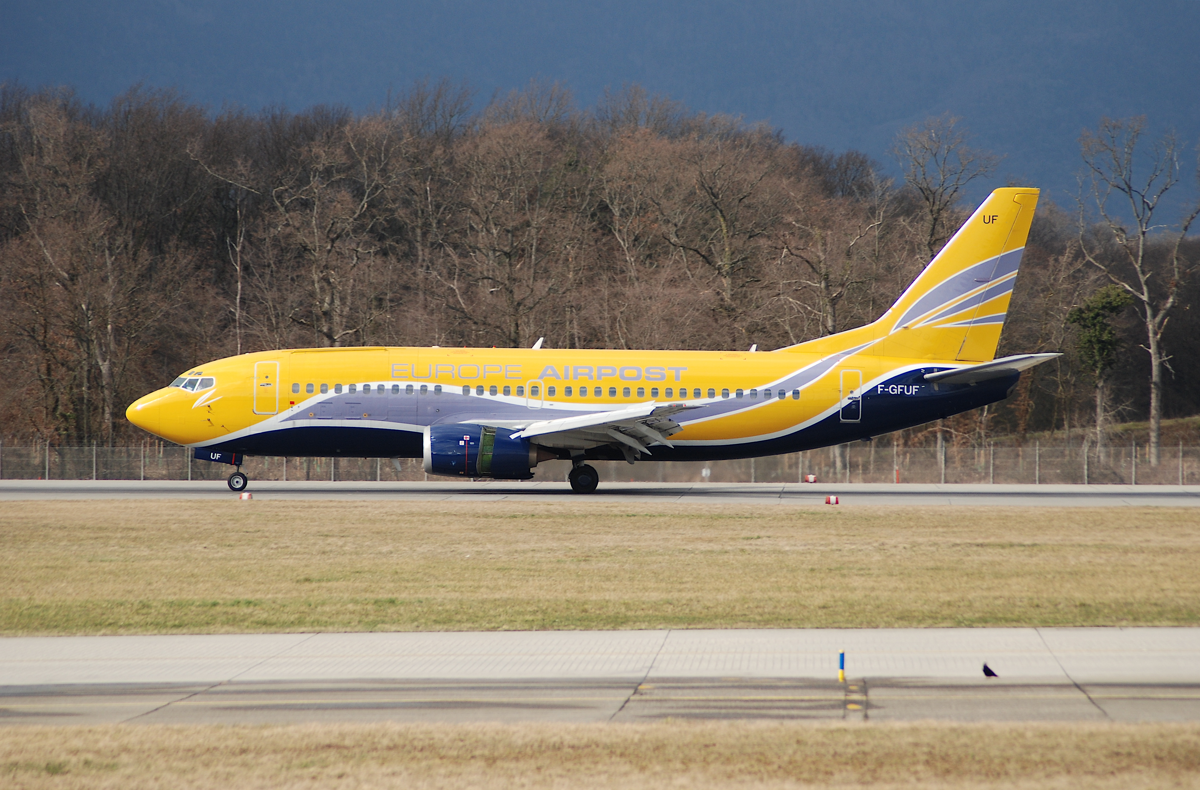 Europe Airpost Boeing 737-300; F-GFUF@GVA;24.02.2007/451dd